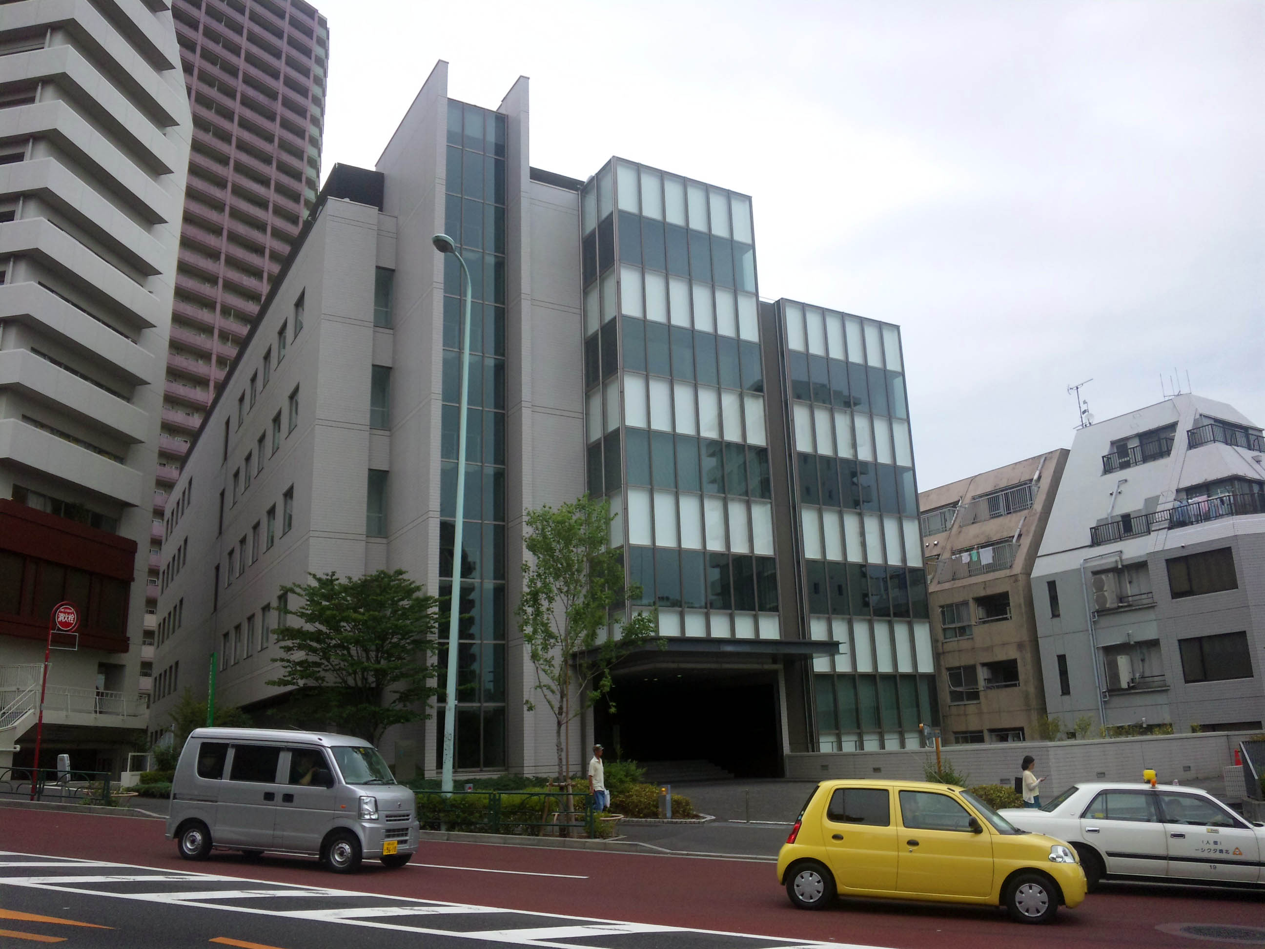 新宿イーストビル 新宿区富久町 日本データコム本社